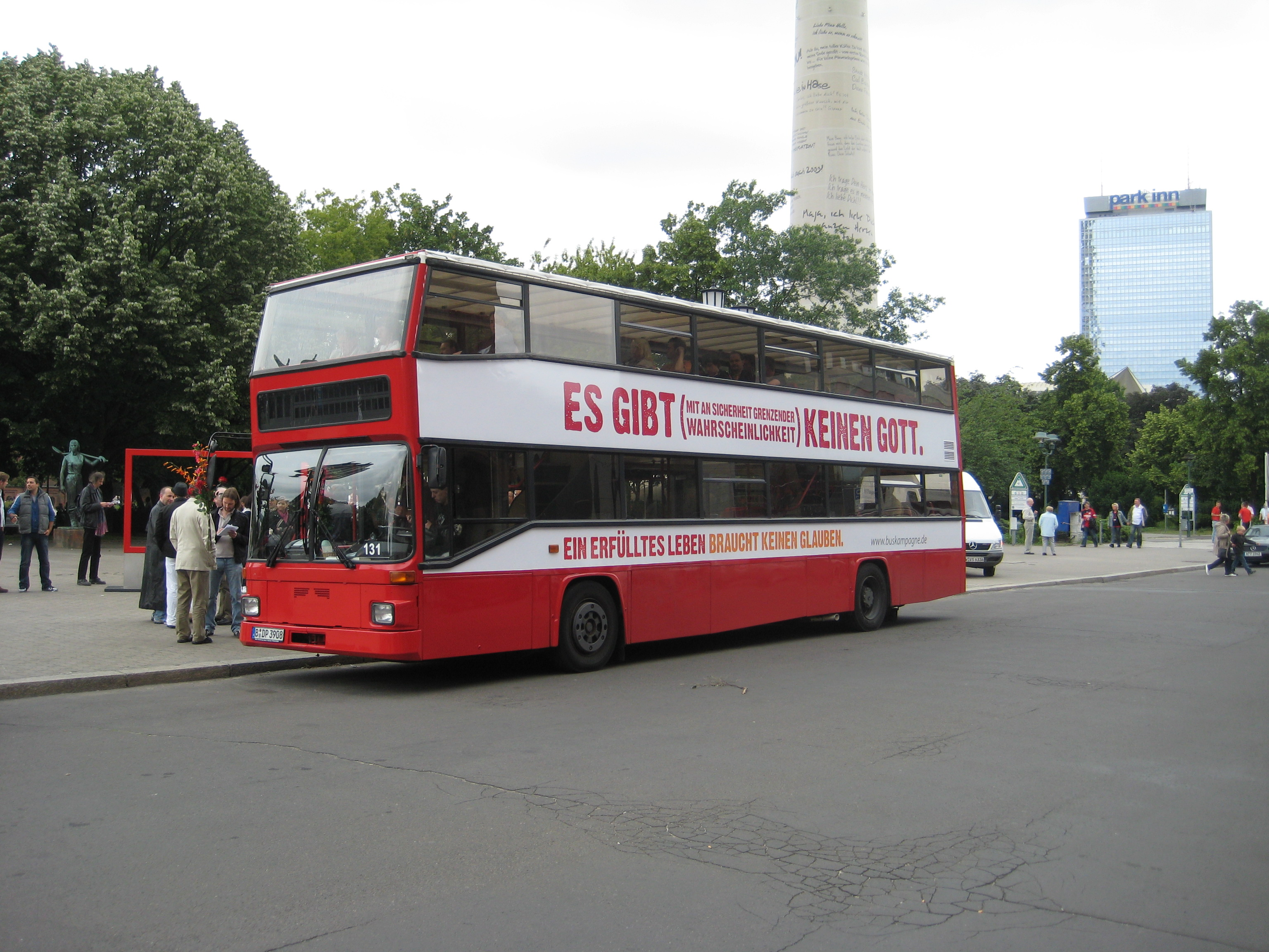 Bus der atheistischen Buskampagne in Berlin